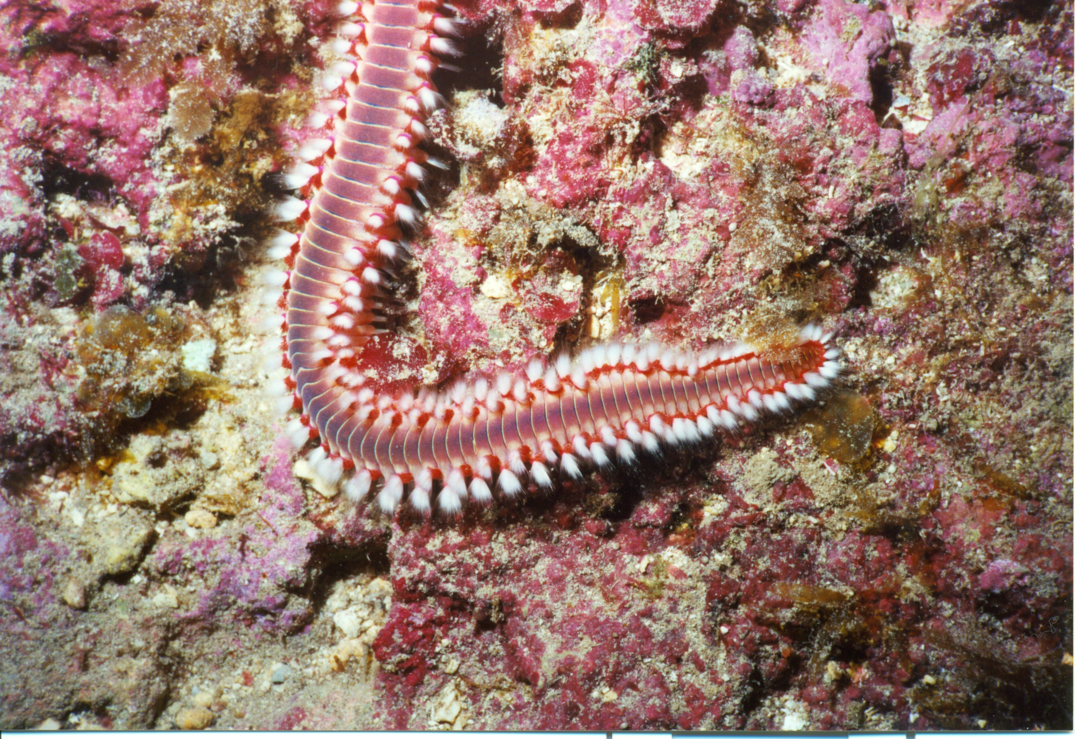 Feuerwurm Gozo